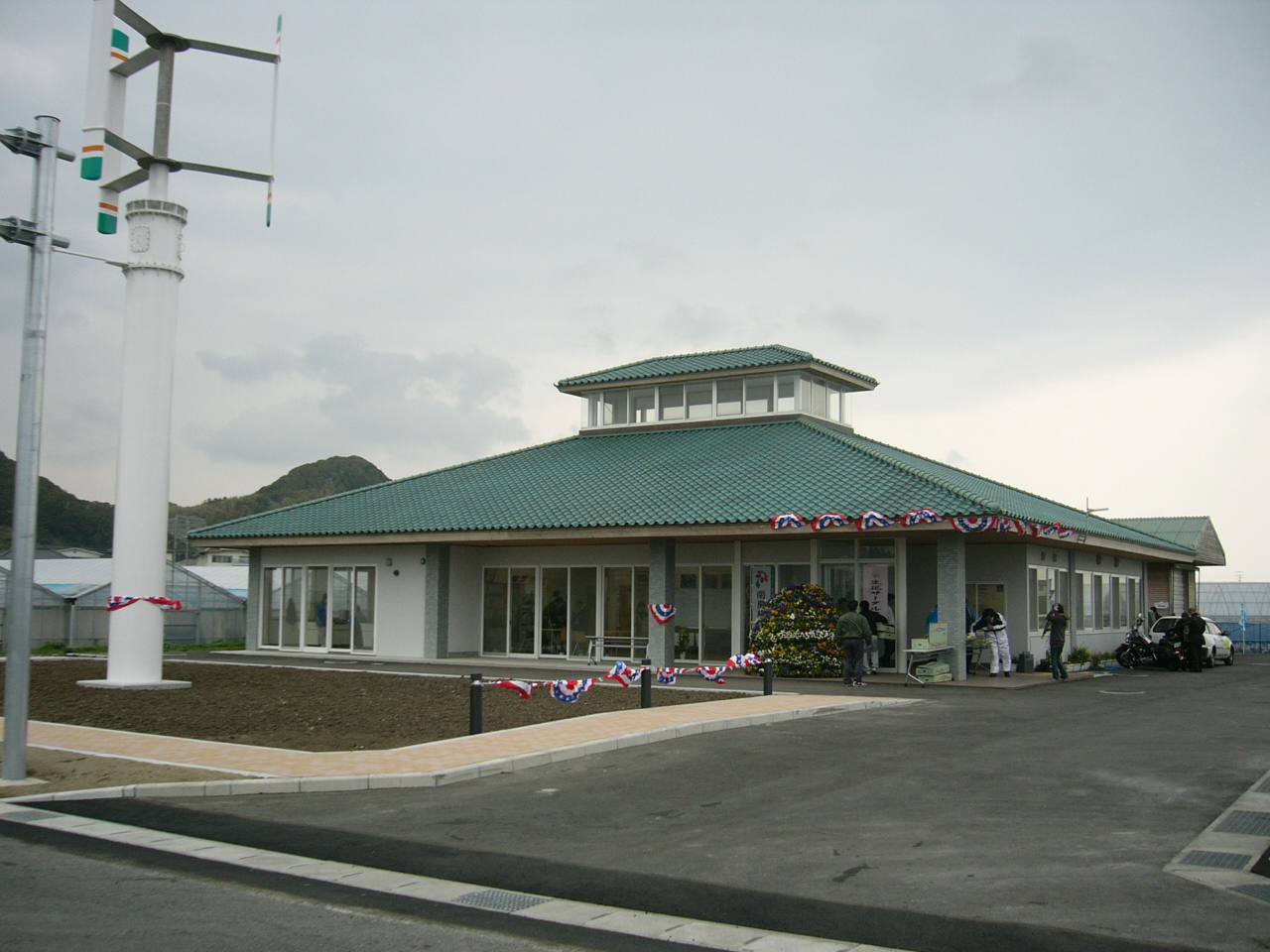 Michinoeki Shirahama-Nojimazaki (道の駅白浜野島崎 Chiba)